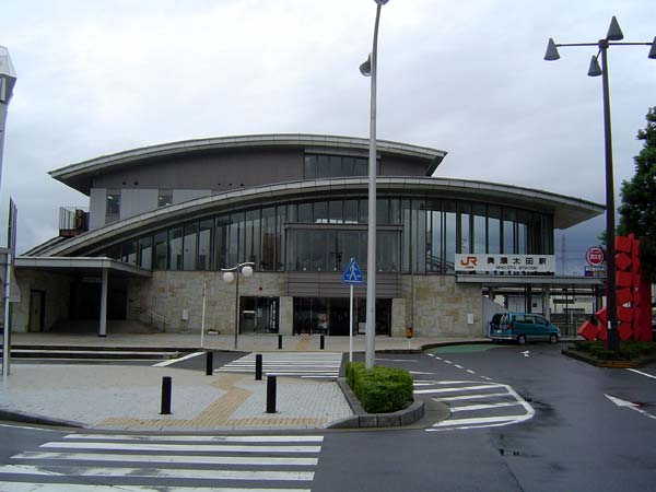 美濃太田駅南口（2004年9月5日撮影） Category:美濃加茂市の画像